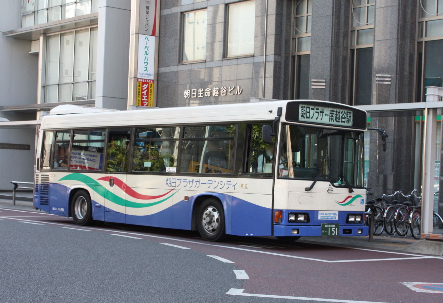 グローバル交通 新越谷駅東口にて撮影